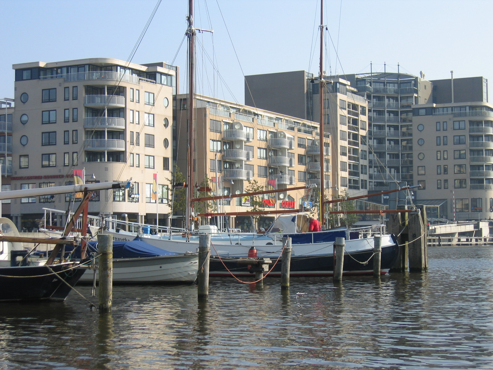 Hafen und Einkaufcenter in Alkmaar.